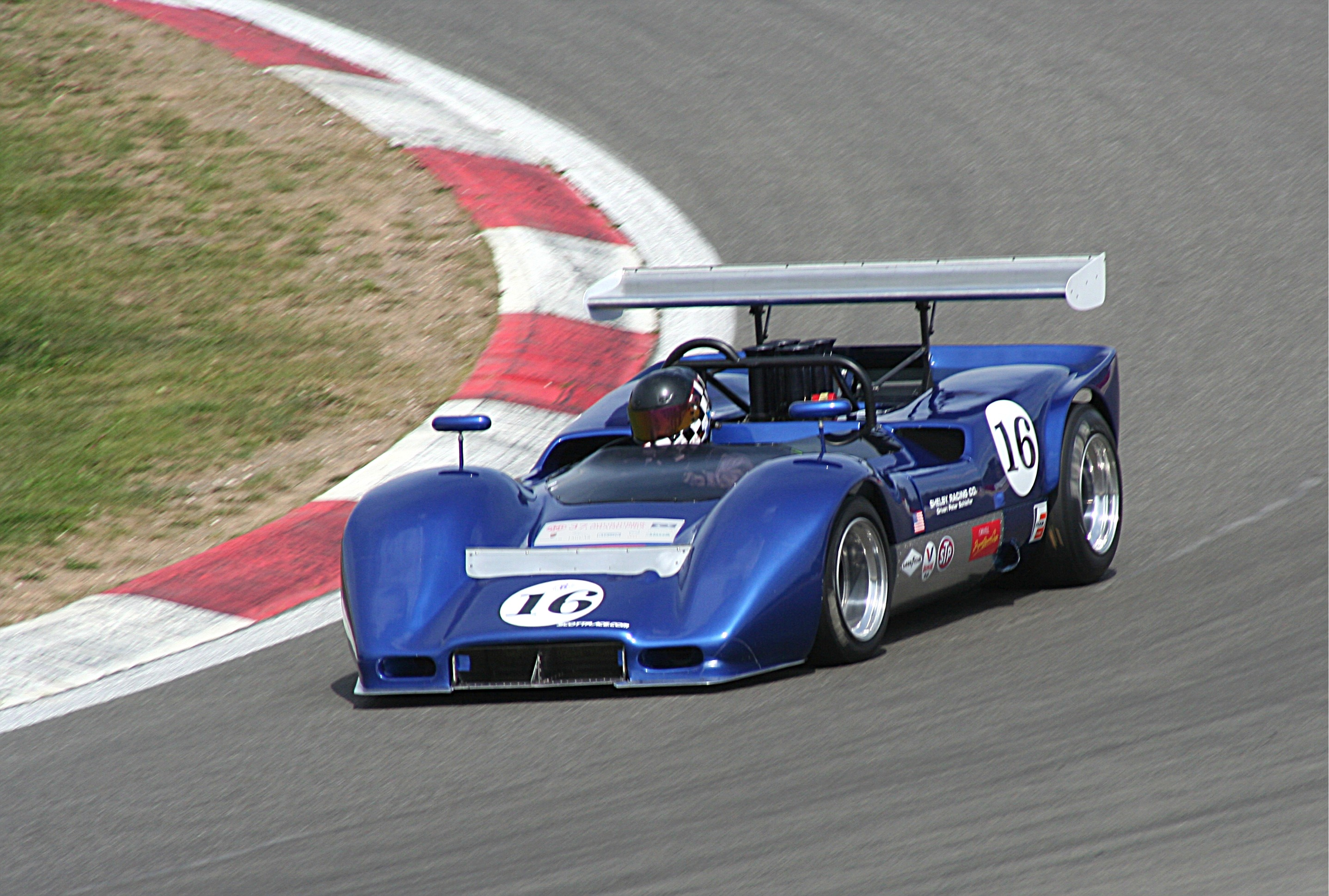 McLaren M6B, Baujahr 1968, beim AvD-Oldtimer-Grand-Prix 2009 in der Fordkurve des Nürburgrings